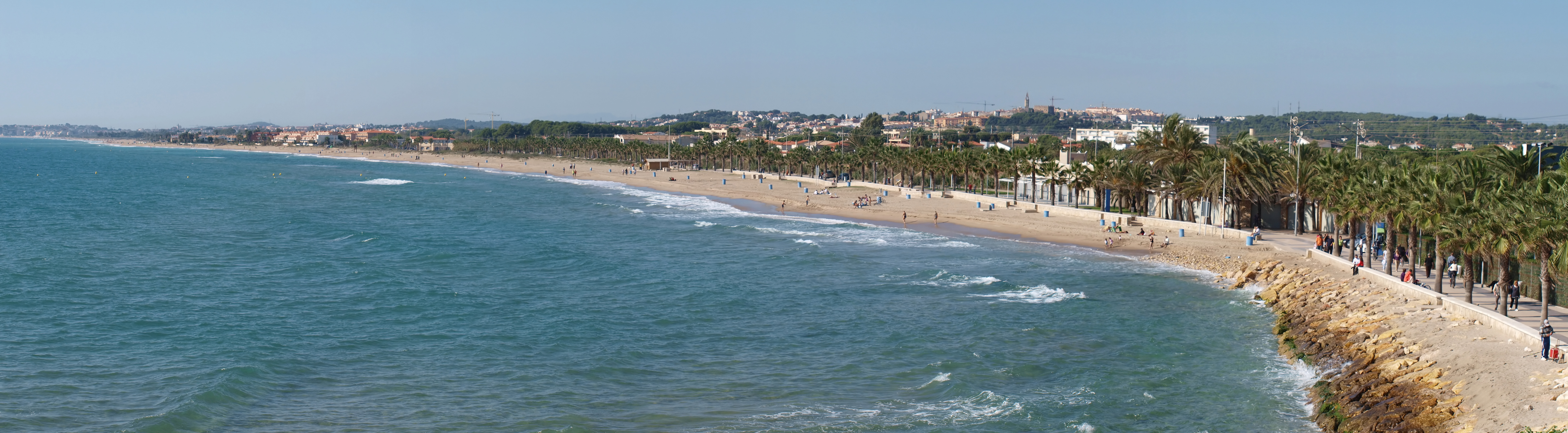 Panorama de la Playa Larga de Roda de Barà en Tarragona, España